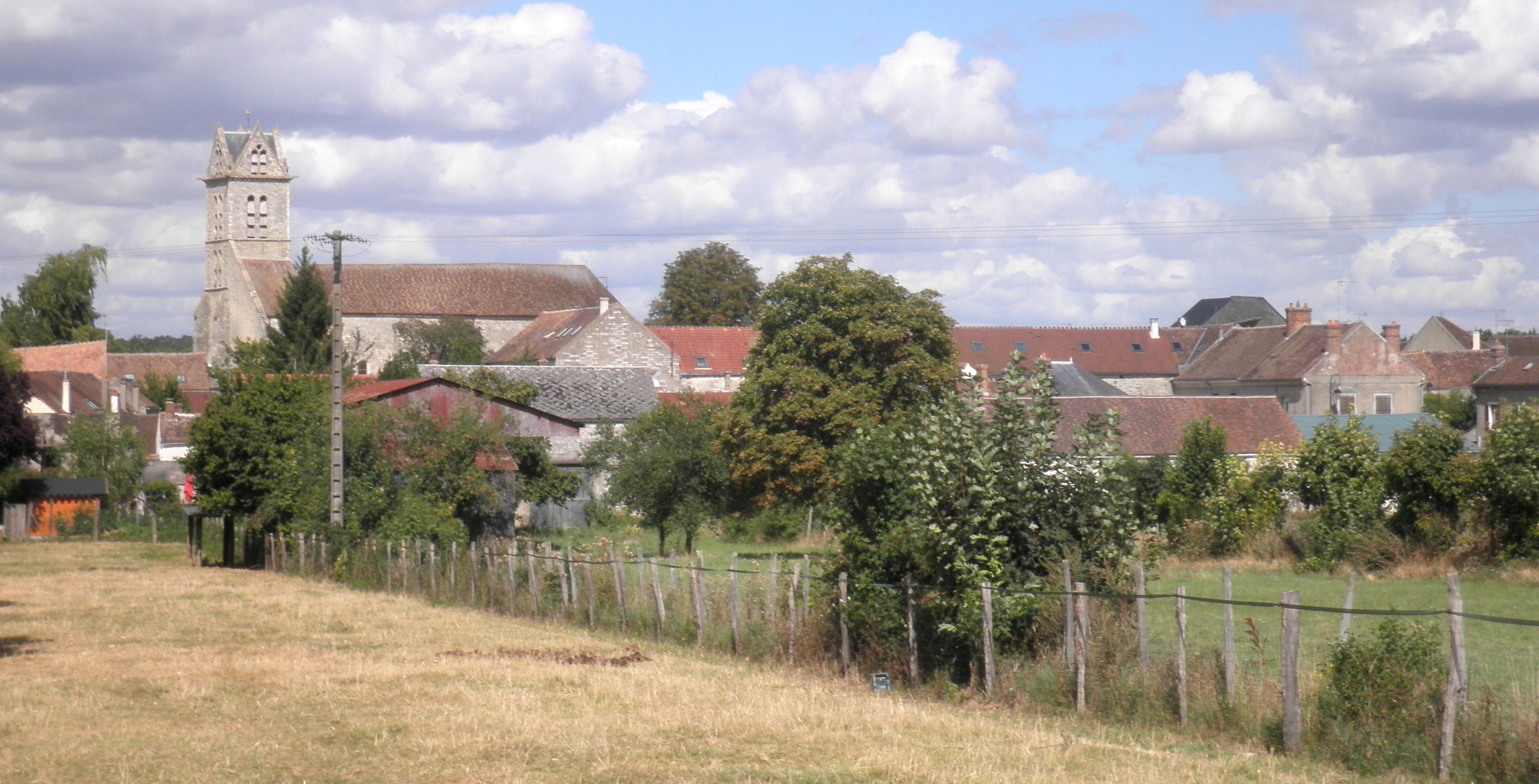 Ury, vue de la route d'Achères.